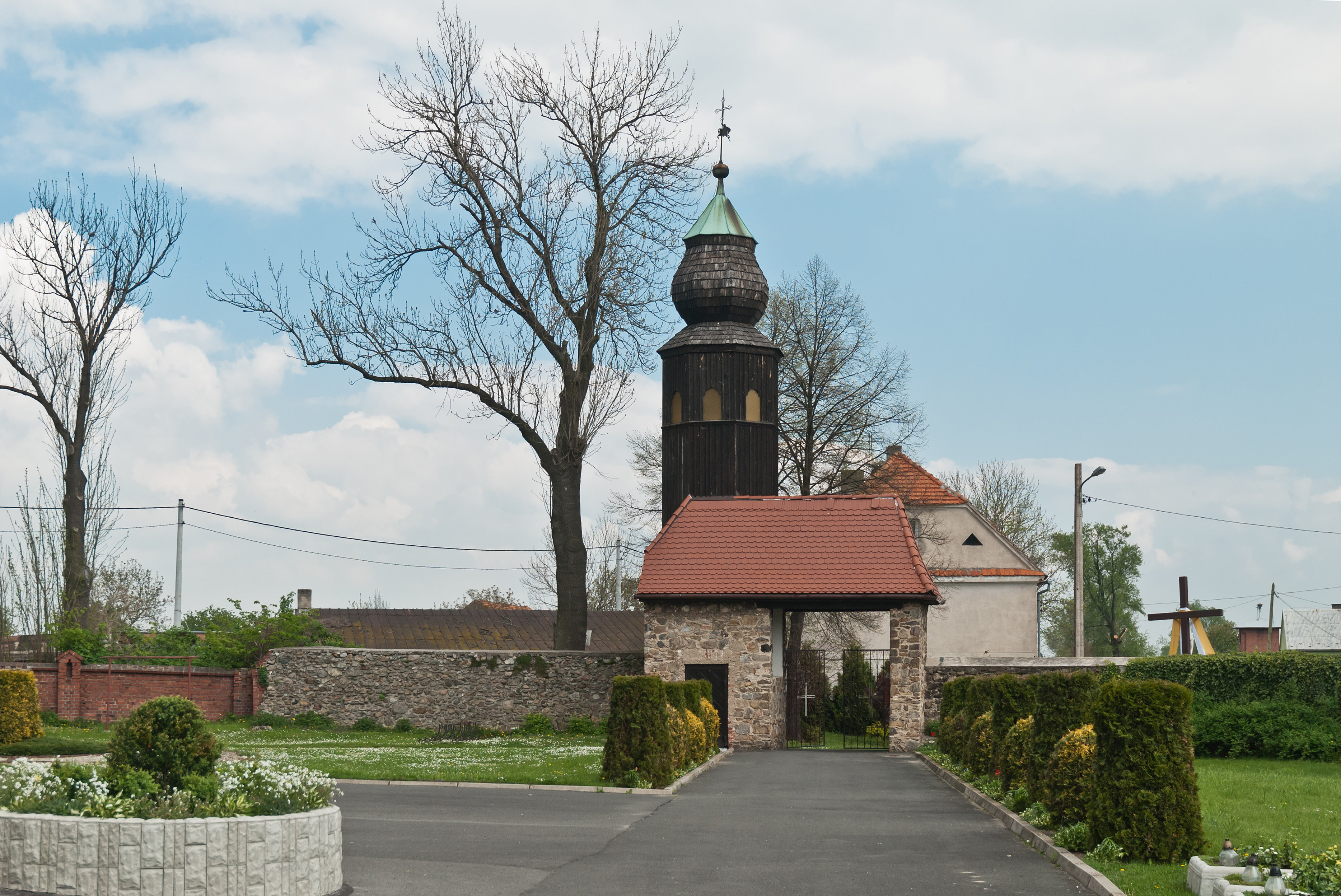 Kamienica, mur z bramkami, XVI, XVIII